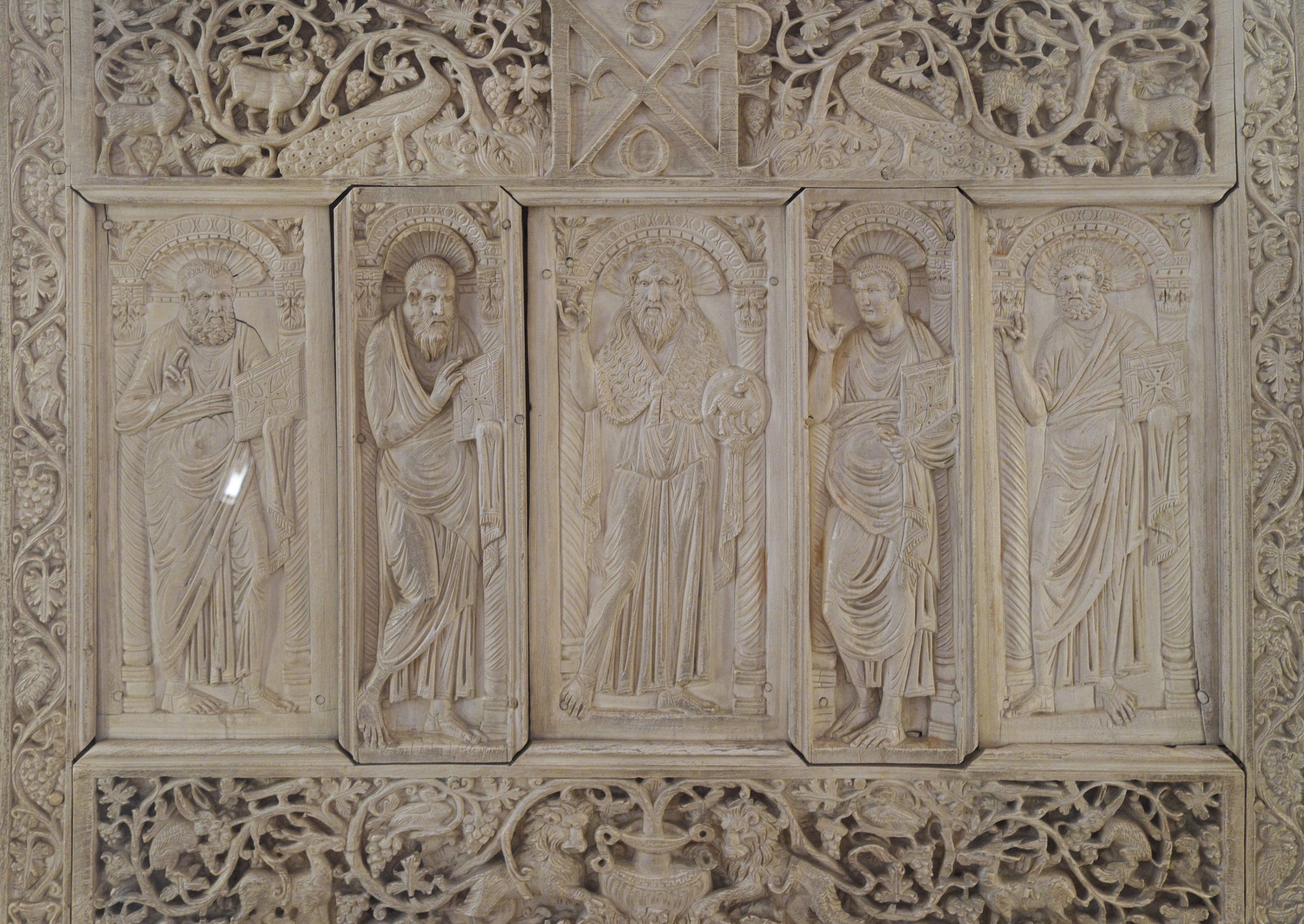 Maximianskathedra im Erzbischöflichen Museum in Ravenna (Emilia-Romagna/Italien), Darstellung: Evangelisten und Johannes der Täufer